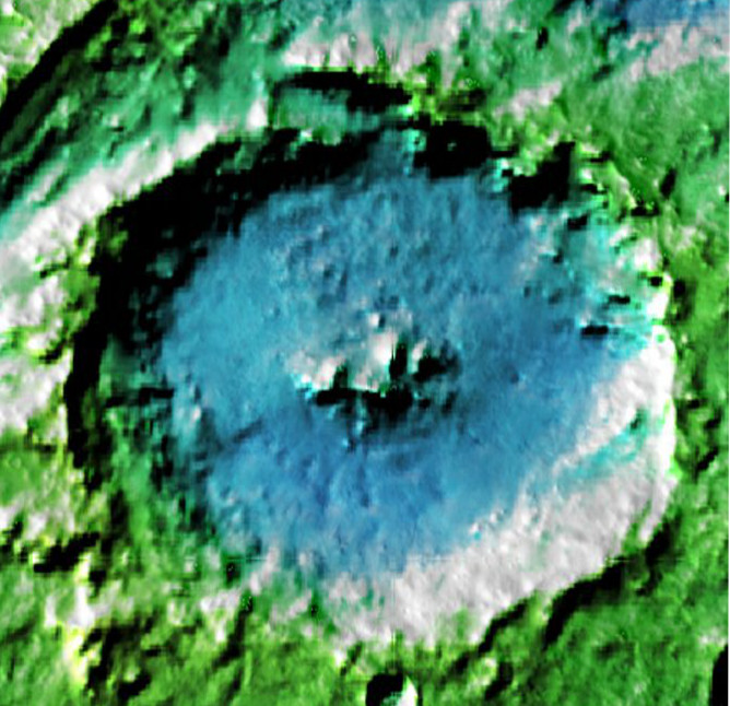 Cráter marciano Perepelkin. (Imagen IAU/USGS/Goddard/A SU/USGS)